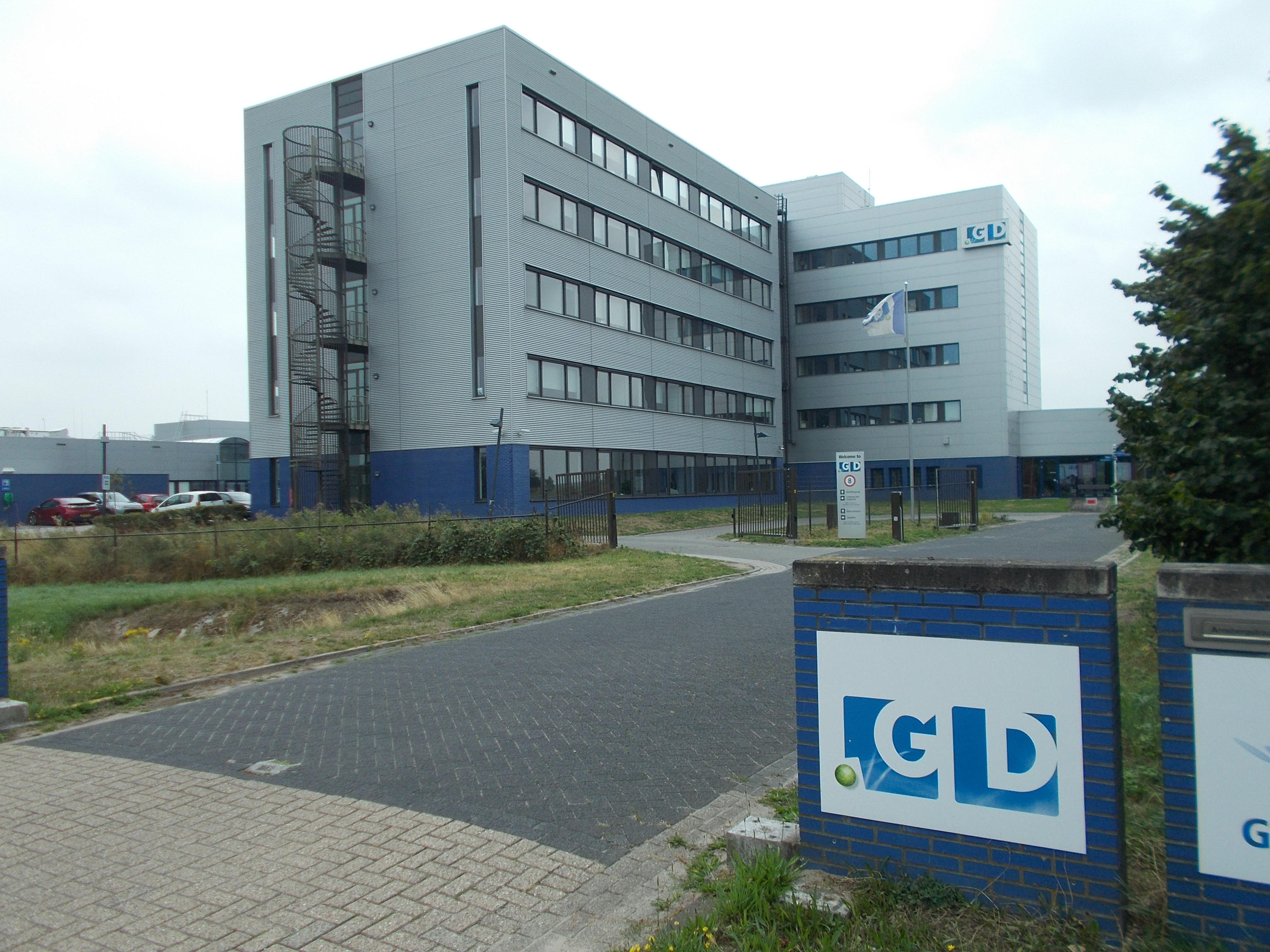 'Gezondheidsdienst voor Dieren bv' is gevestigd op industrieterrein Kloosterlanden te Deventer